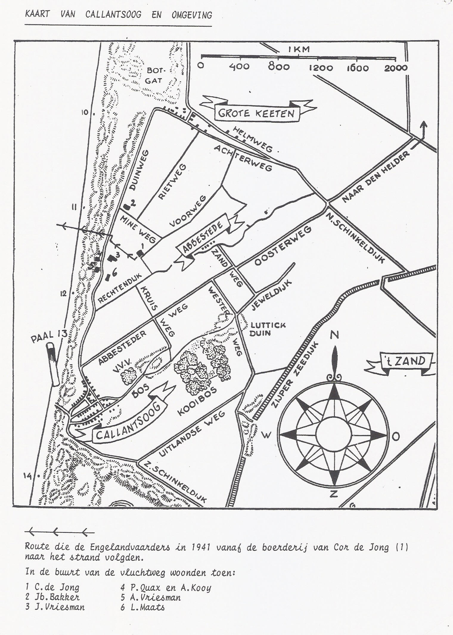 Engelandvaardersroute.